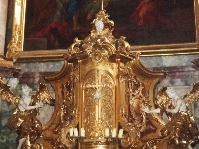 Studienkirche Mariä Himmelfahrt, Dillingen an der Donau Hochaltar, Tabernakel